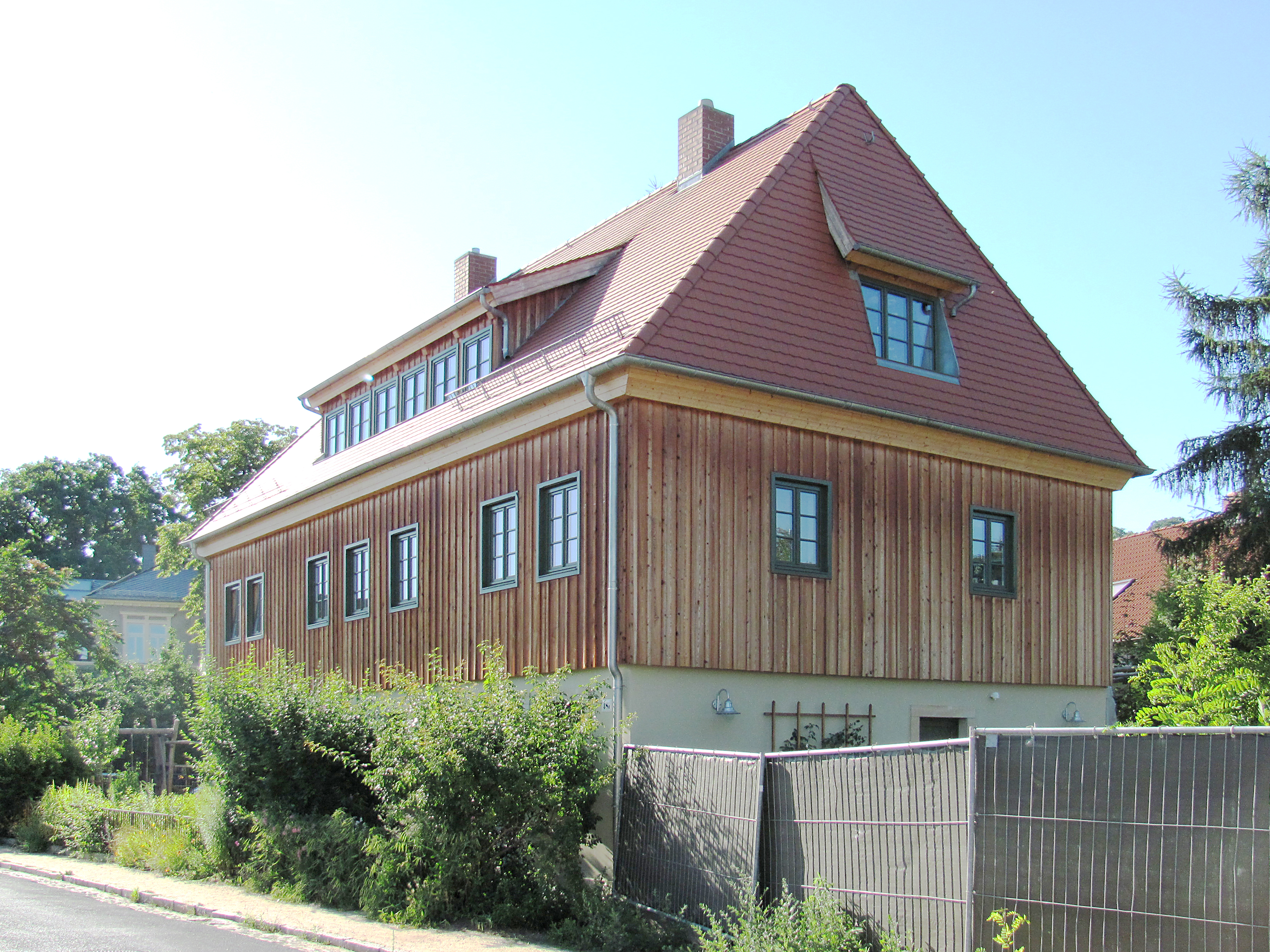 Radebeul, Haus Clauß von Osten